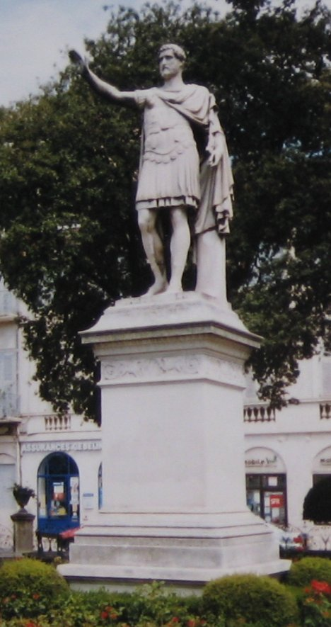 A. Pius